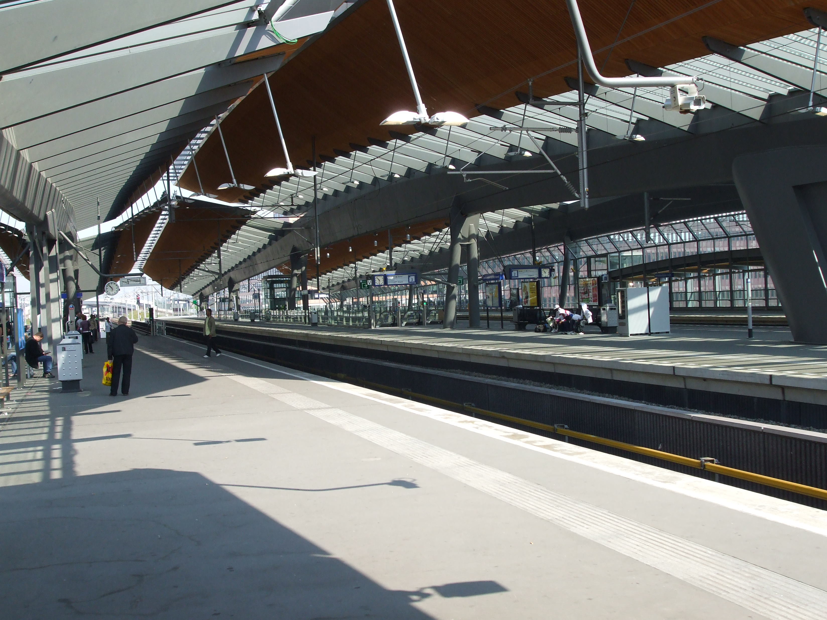 Station Amsterdam Bijlmer ArenA (juni 2008)